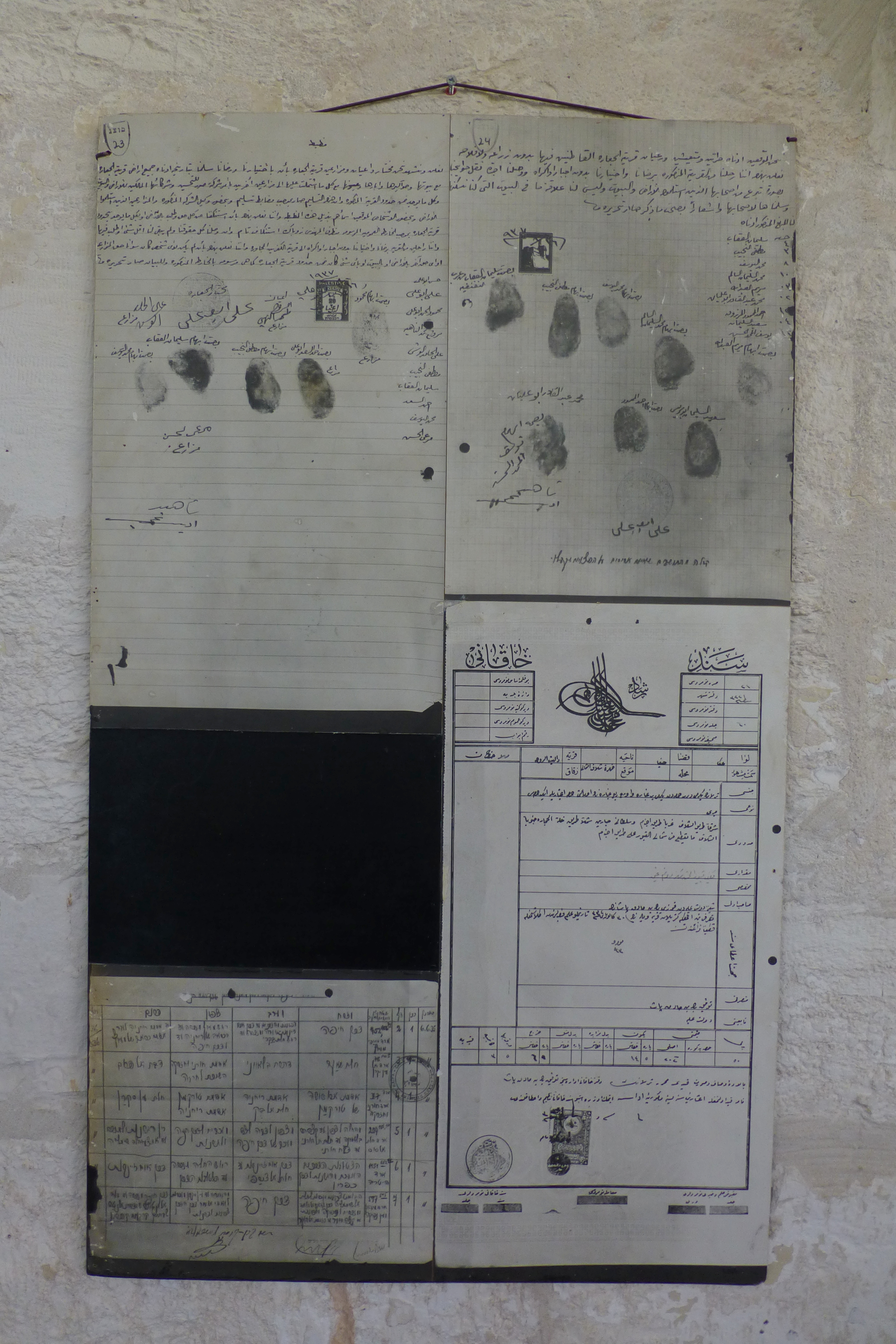 ג'וערה הוא בסיס גדנ"ע ומוזיאון הנמצאים על גבעה ברמות מנשה, במיקום היסטורי ששימש בעבר כבסיס ההדרכה המרכזי למפקדים של ארגון "ההגנה". שמה העברי של הגבעה הוא "גבעת נֹח".